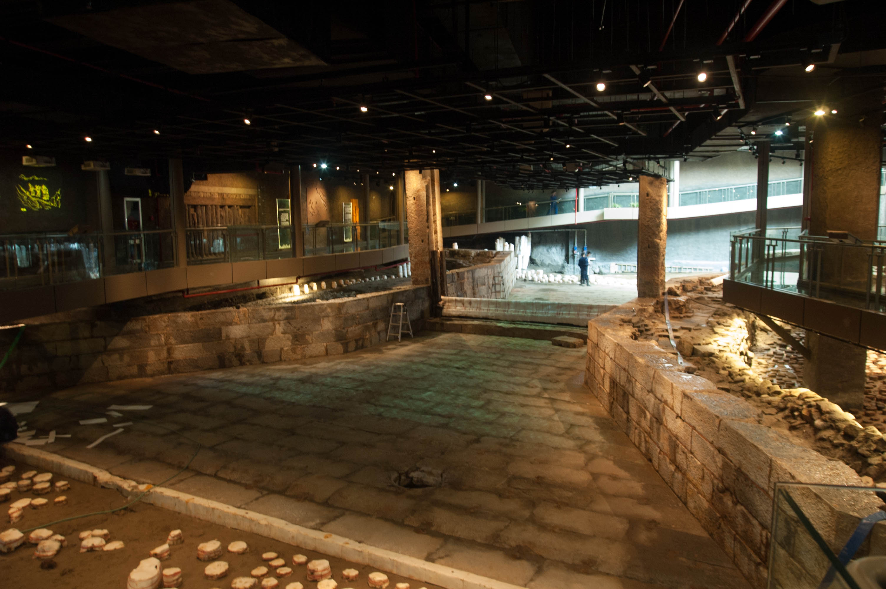 上海元代水闸